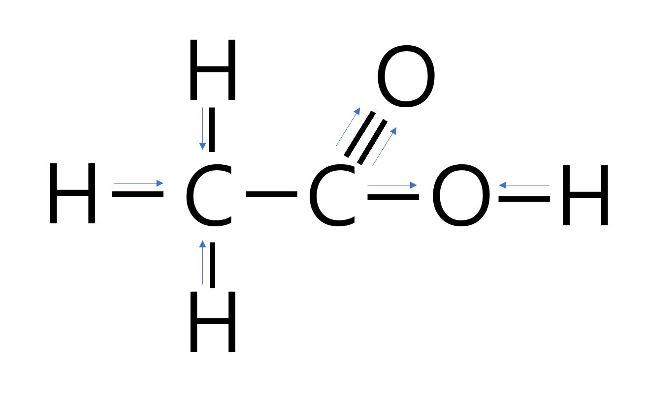 CH3COOH식